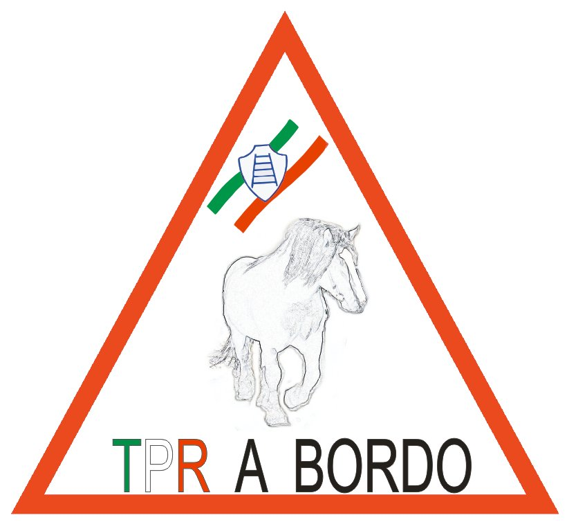 TPR a bordo - logo trasporto anacaitpr